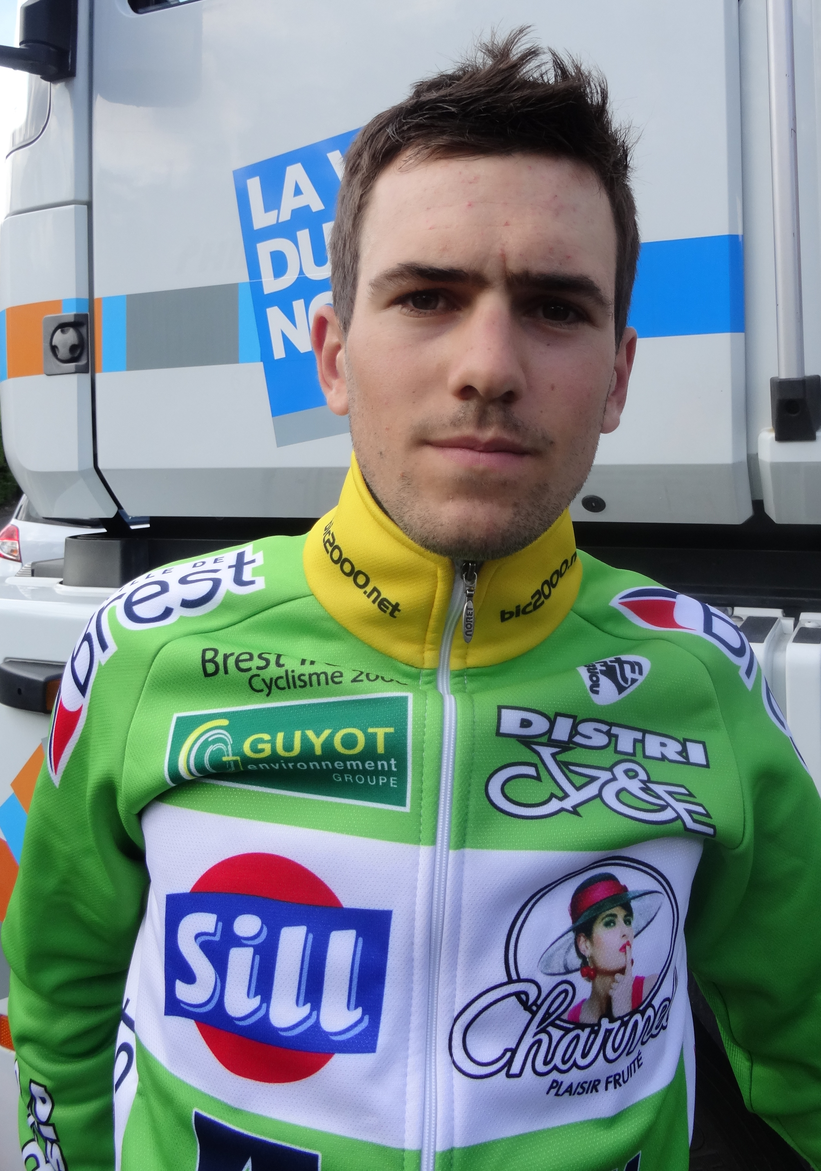 Reportage photographique réalisé le vendredi 23 mai 2014 à l'occasion du départ de la première étape du Paris-Arras Tour 2014 à Lens, Pas-de-Calais, Nord-Pas-de-Calais, France. Depicted person: Olivier Le Gac